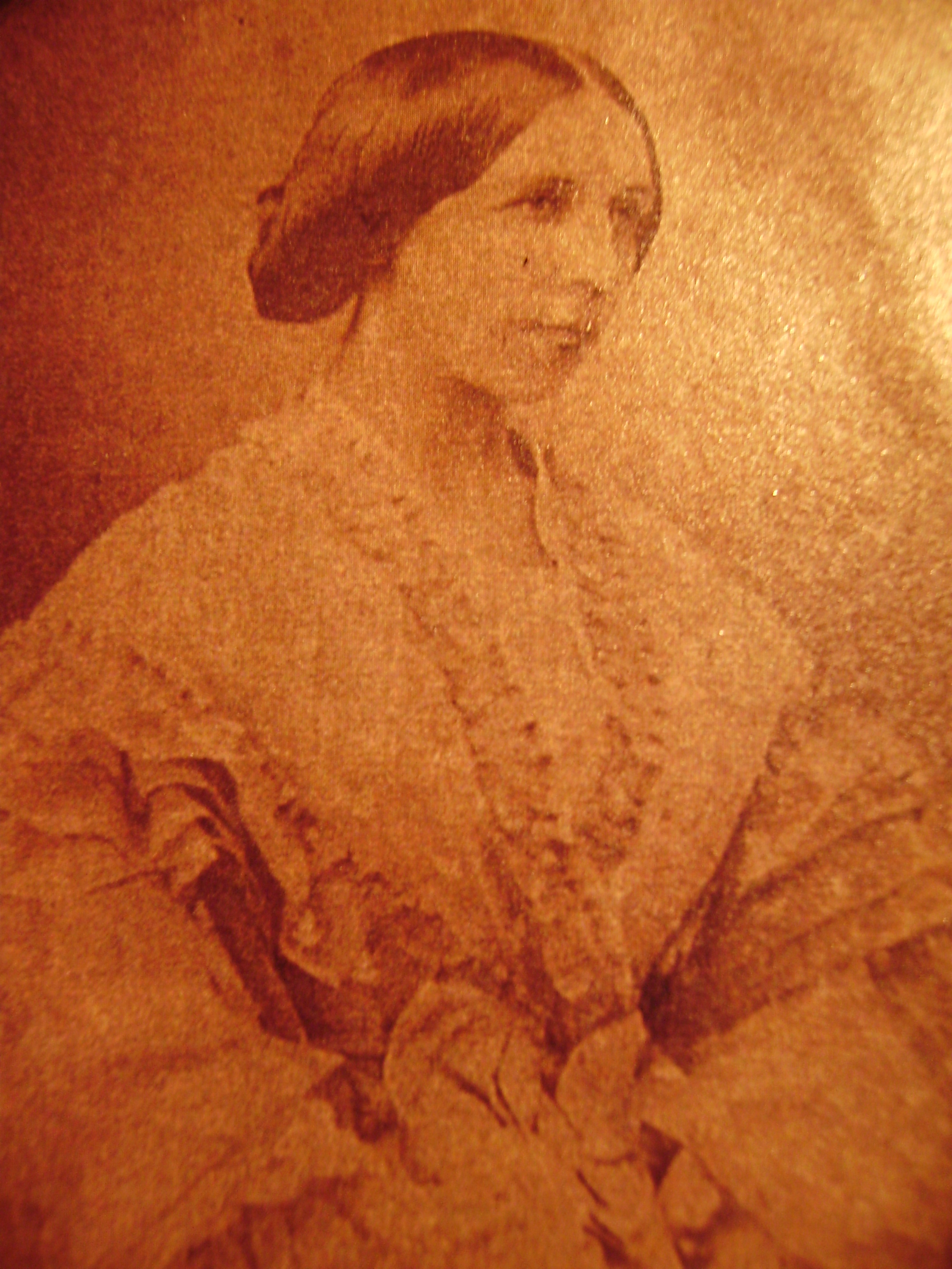 berthe du Bouëxic, comtesse de Guichen, propriétaire du Plantier